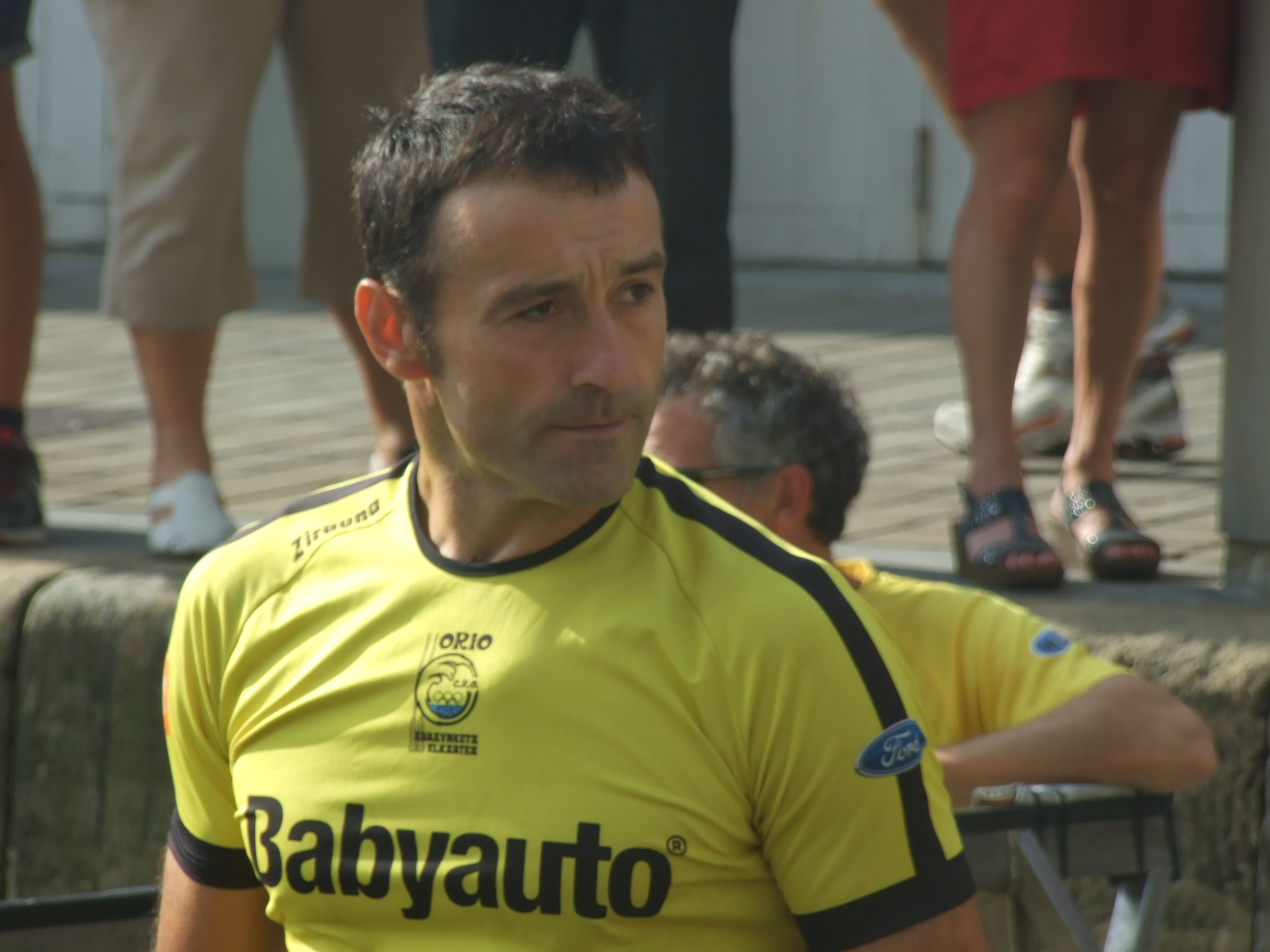 Bandera de la Concha 2016